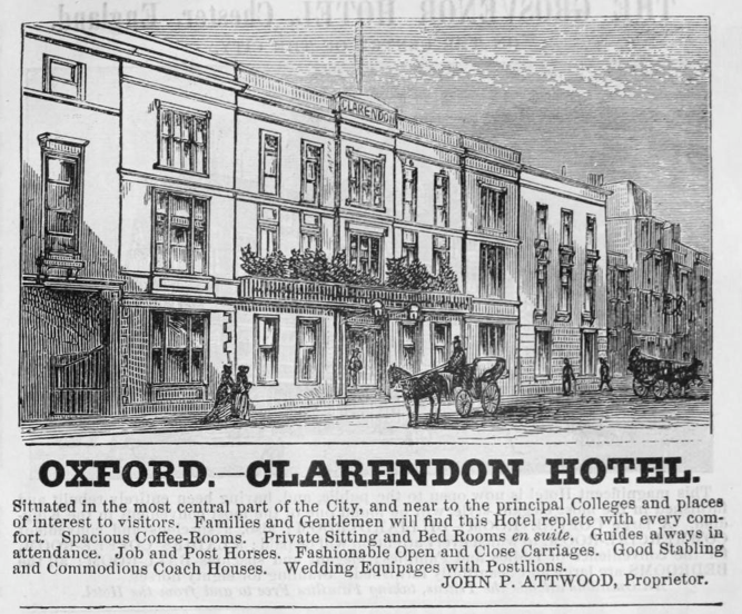 Hotel advertisement